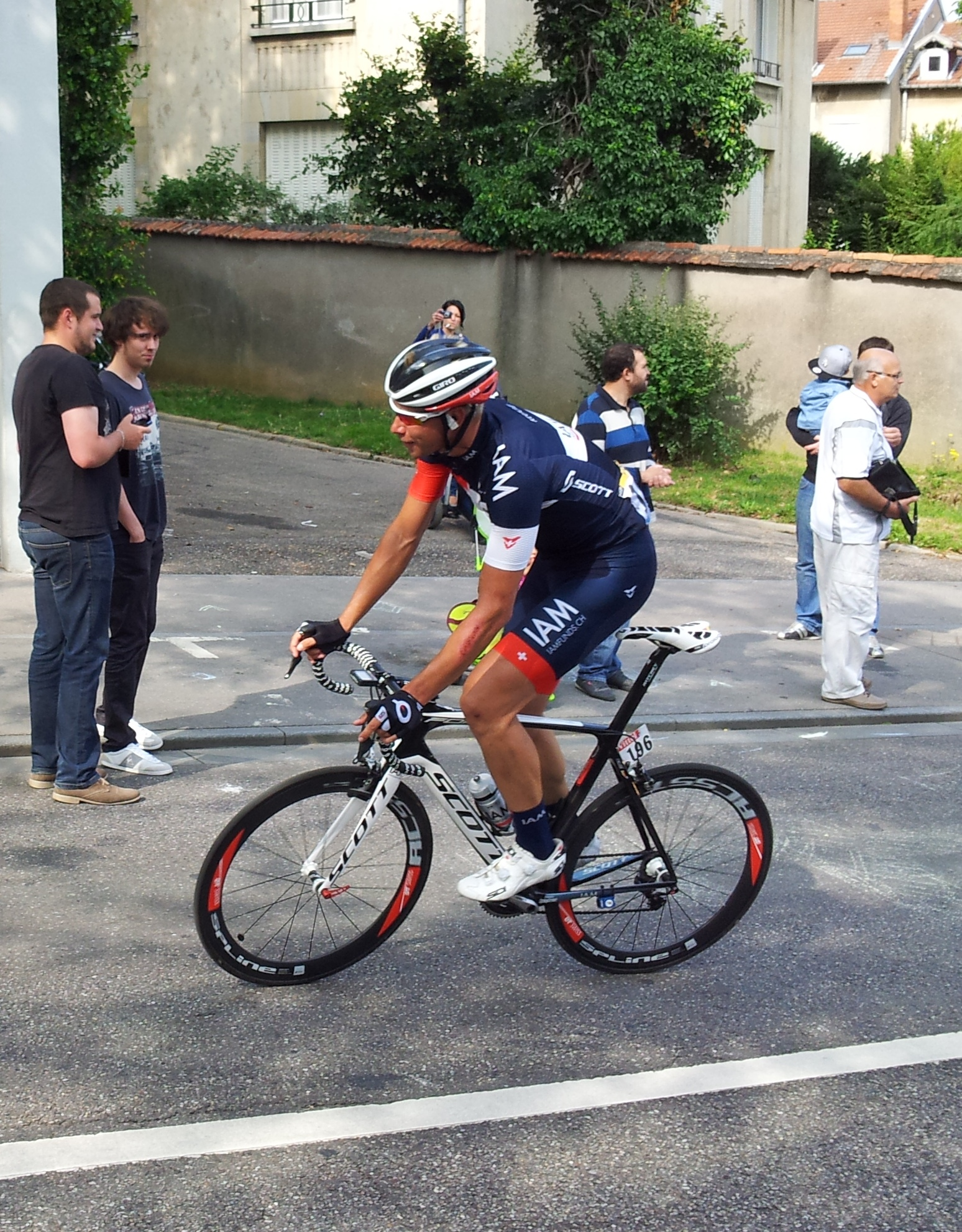 7e étape du Tour de France 2014 au début de la Côte de Boufflers.